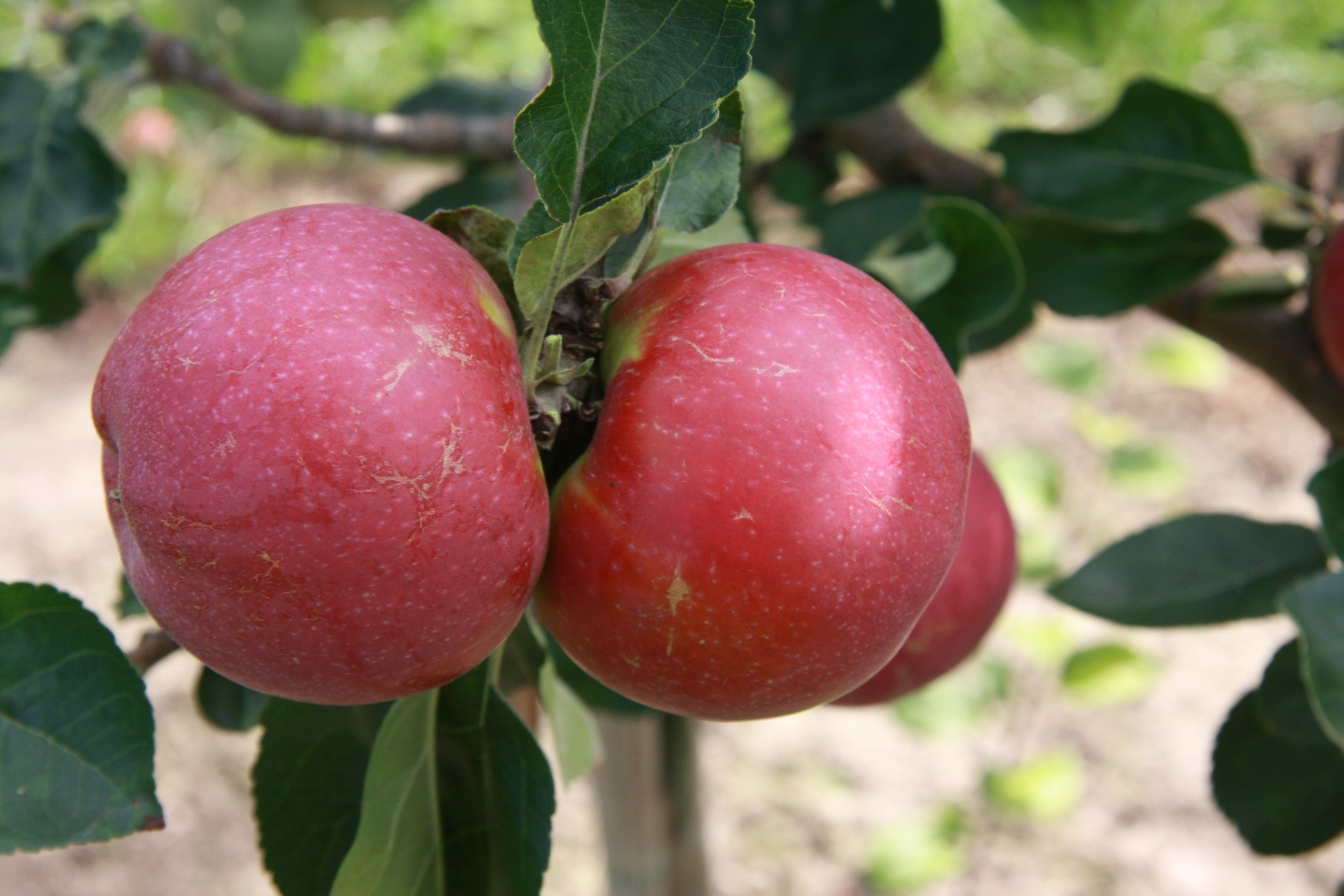 Apple, cultivar 'Lobo', fruit